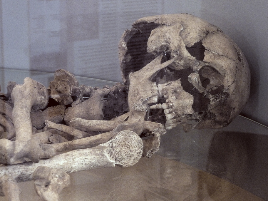 Frankfurt am Main, Stadtteil Schwanheim: Im Schulgebäude aus dem 19. Jahrhundert befindet sich seit 1973 das Heimatmuseum Schwanheim. Das Haus stellt Exponate von der Vor- und Frühgeschichte bis zum 20. Jahrhundert aus. Das Foto zeigt Schulter- und Schädelpartie des Skeletts eines jungen Mannes Anfang 20 aus dem 2./3. Jahrhundert n. Chr. Das nahezu vollständige Skelett wurde mit zahlreichen anderen Funden bei einer archäologischen Grabung der 1970er-Jahre im Schacht eines römischen Brunnens im Schwanheimer Wald entdeckt. Anthropologische Untersuchungen durch die Goethe-Universität Frankfurt ergaben, dass es sich wahrscheinlich um das Skelett eines römischen Sklaven handelt, der durch Gewalteinwirkung (Schädelverletzung) zu Tode gekommen war. Die weiteren Funde im Brunnenschacht deuten auf eine Sonderbestattung hin